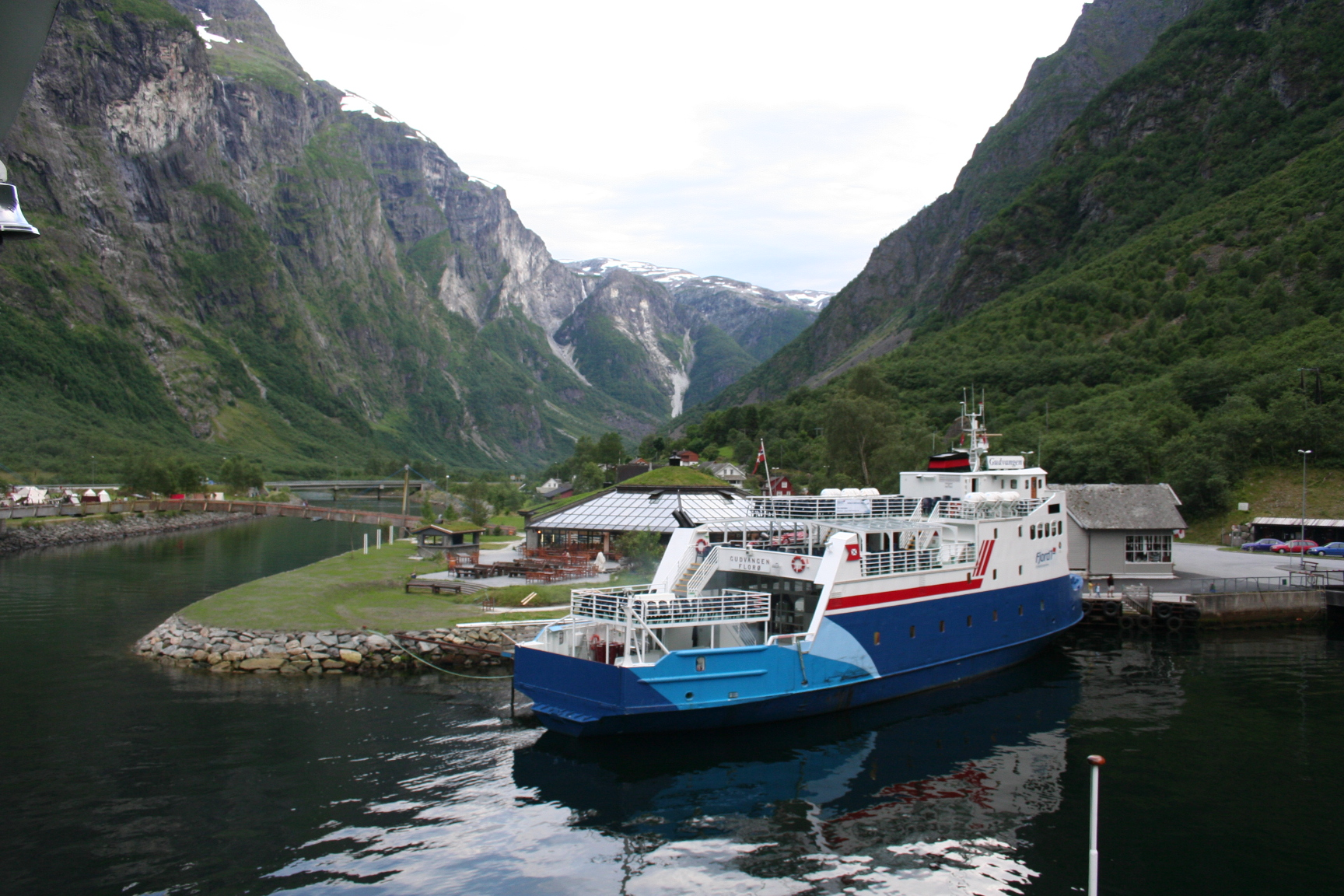 Gudvangen, Hafen. Nynorsk: MF Gudvangen i Gudvangen. Det er Nærøydalselvi som renn ut i Nærøyfjorden til venstre.